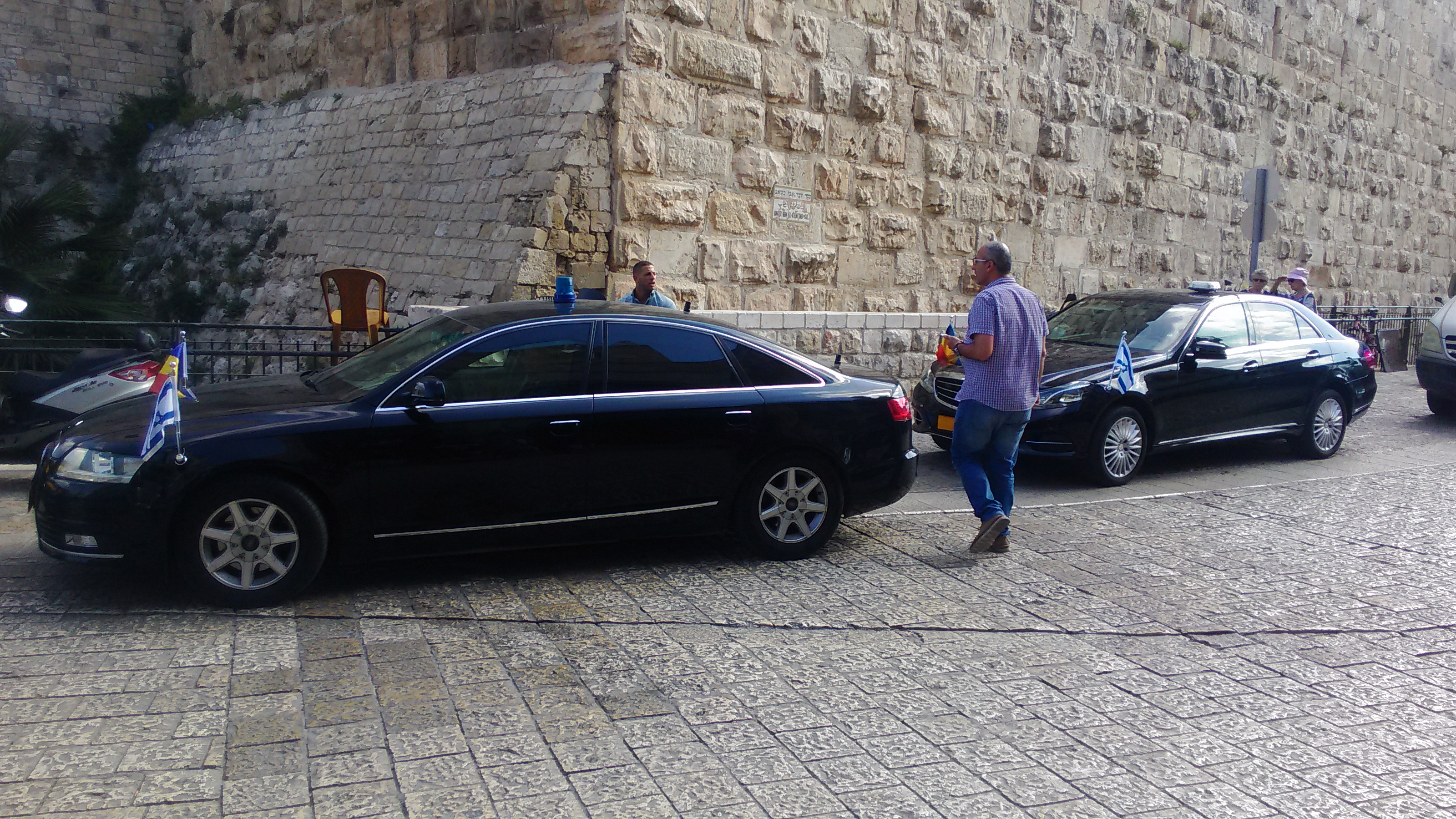 שיירת ראש ממשלת רומניה סורין גרינדיאנו בביקור בישראל, 2017